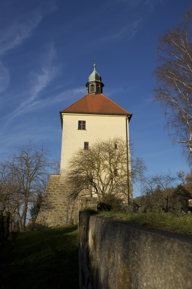 Blasturm - Ein Wehrturm der mittelalterlichen Befestigung der Stadt Schwandorf und Geburtshaus von Konrad Max Kunz